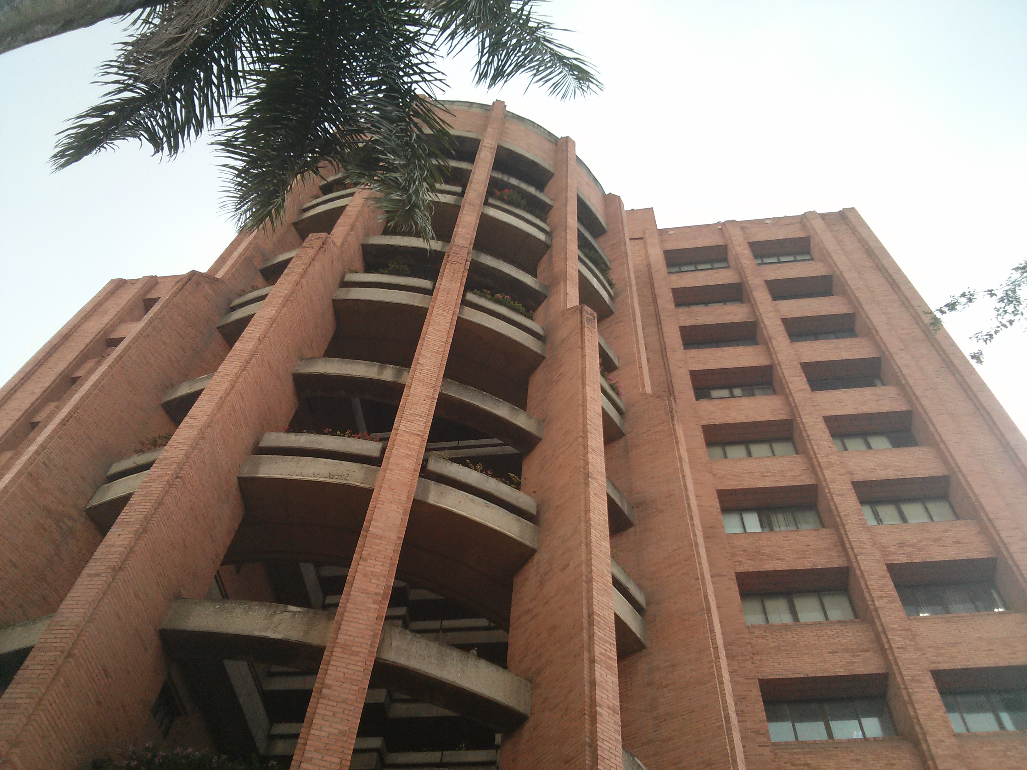 Ubicación: CALI, VALLE DEL CAUCA